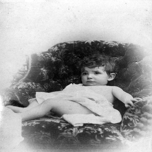 ריכרד ליכטהיים בן שנה 1886 (בתוך אלבום של משפחת ליכטהיים לדורותיה בראש האלבום עמוד עם כל פרטי המשפחה שלא צולם!)